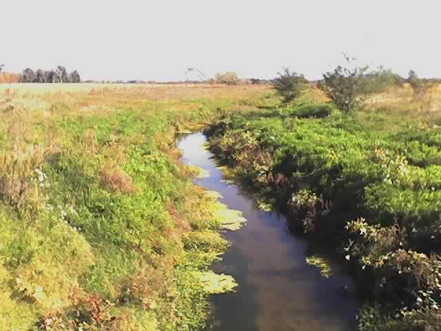 Town of Veinte de Junio, La Matanza Partido, Buenos Aires Province.